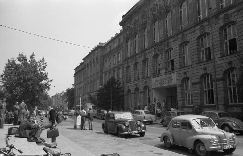 Stadtaufnahmen in Frankfurt/Main Johann Wolfgang Goethe-Universität